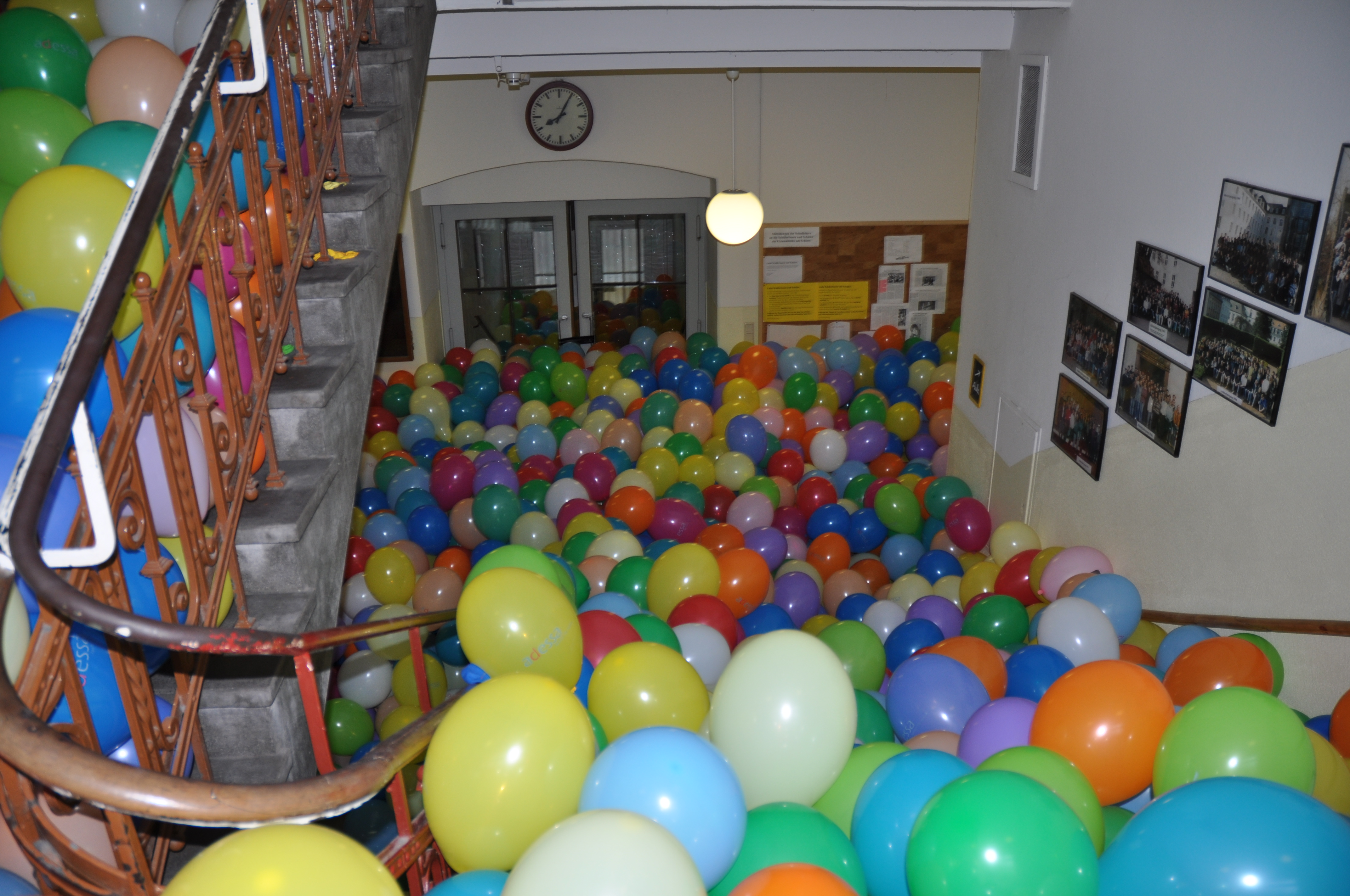 Abistreich 09 Gymnasium am Schloss